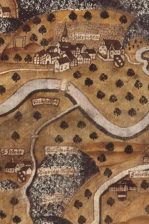 Ortsansicht Bieringen, Ausschnitt aus der Karte der Ritterschaftlichen Freien Pürsch in Schwaben am Neckar und im Schwarzwald (Signatur: Staatsarchiv Sigmaringen K I Sch/1) eines unbekannten Zeichners um 1605, 1705 kopiert von Johann Ulrich Stierlin, Zeugwart und Feldmesser auf Hohentübingen